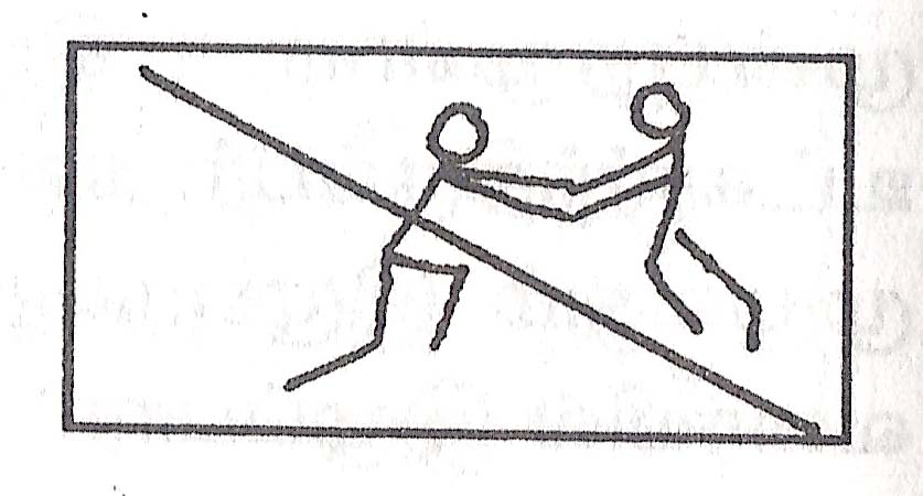 பூப்பறிக்க வருகிறோம் விளையாட்டை உணர்த்தும் கோட்டுருப் படம். மறைகின்ற விளையாட்டுகள் என்னும் எனது நூலிலிருந்து எடுத்துப் பதிவேற்றப்பட்டது.